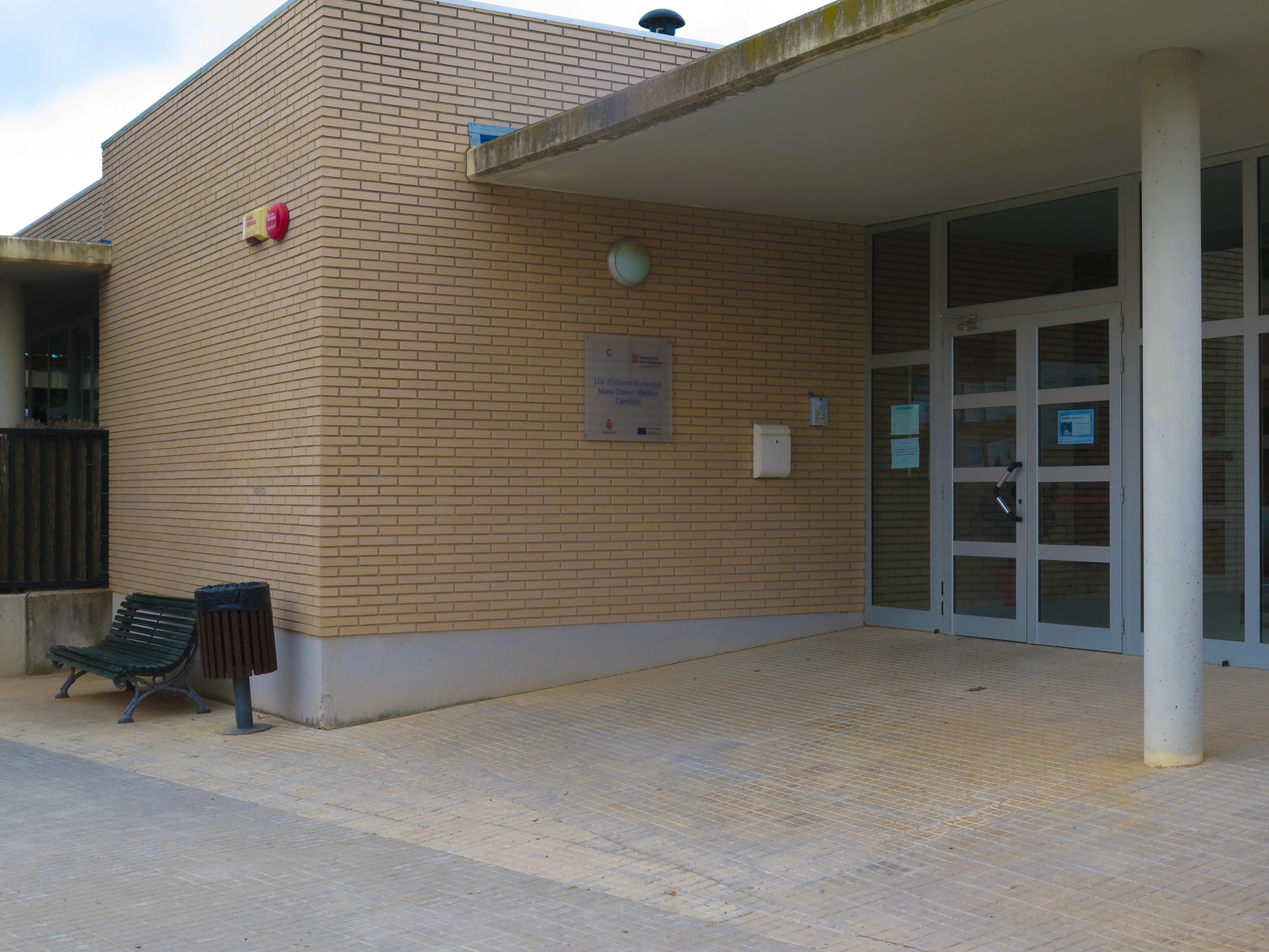 Primera escola bressol de municipal de Cambrils